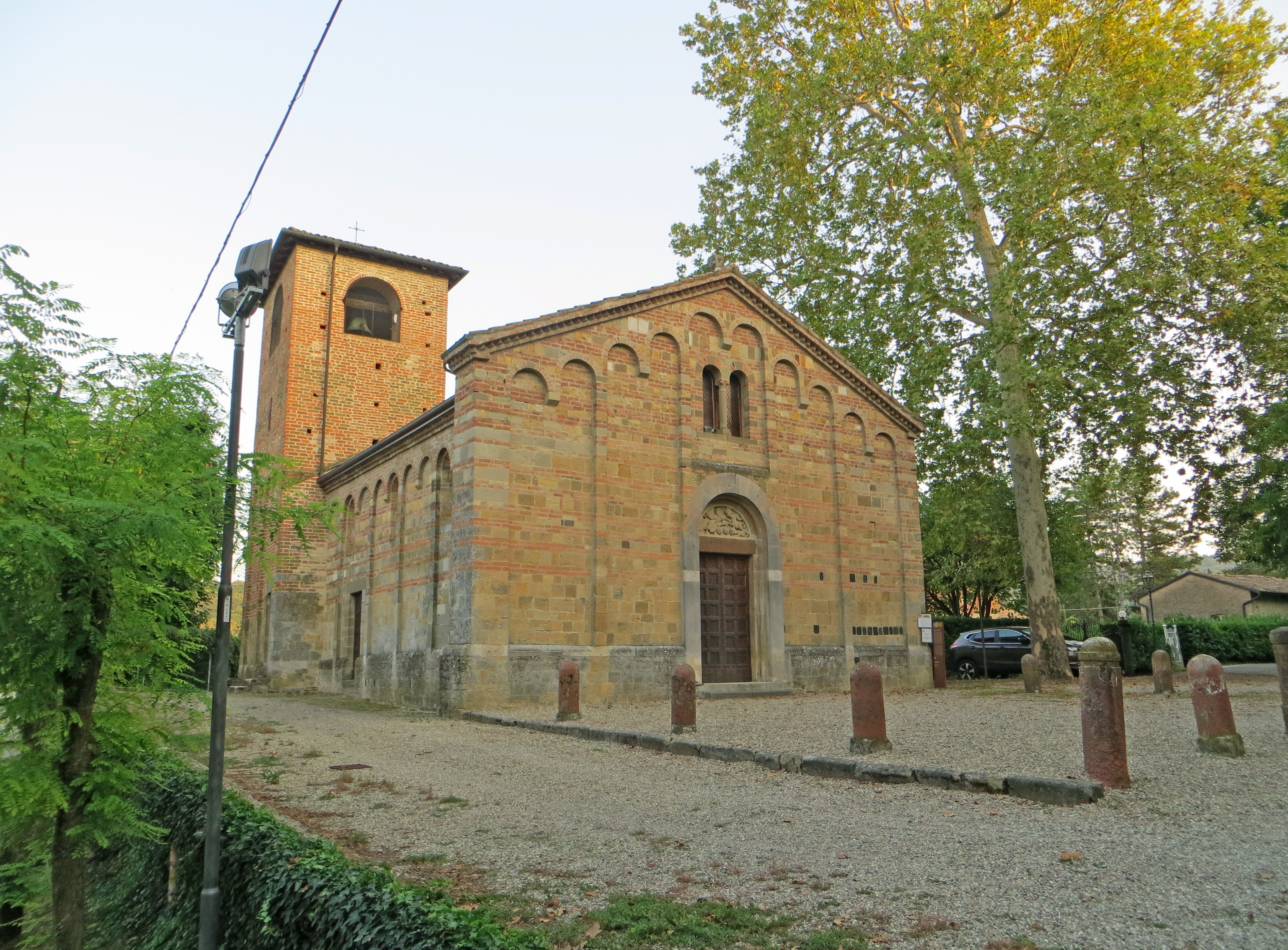 Facciata e lato nord della pieve di San Biagio This is a photo of a monument which is part of cultural heritage of Italy.